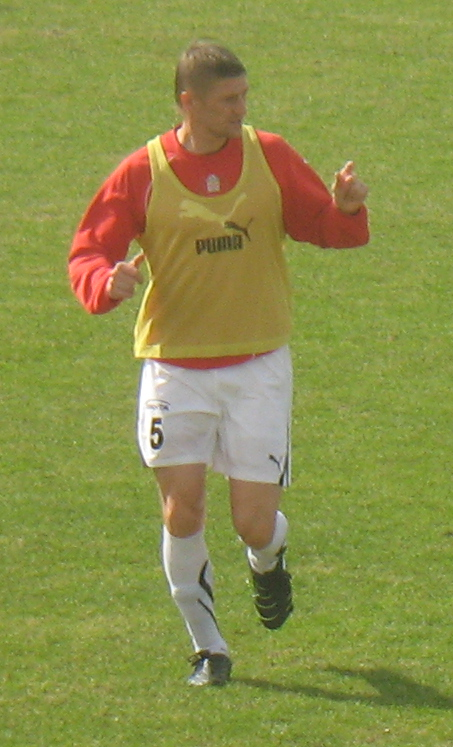 Владимир Езерский перед матчем против "Динамо" Киев